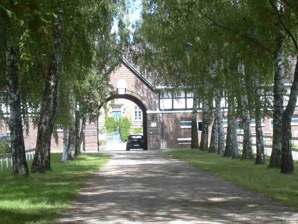 Die Einfahrt zur Burg Sievernich